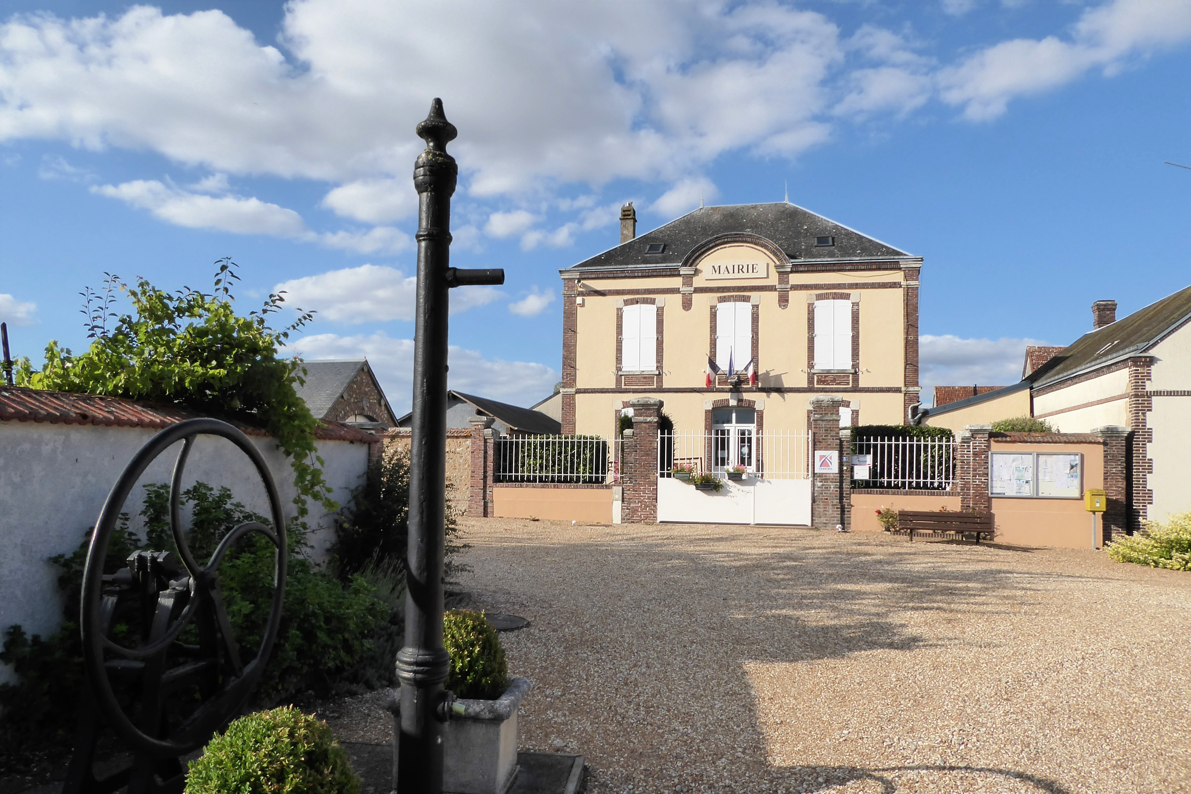 mairie, Nogent-sur-Eure, Eure-et-Loir (France).